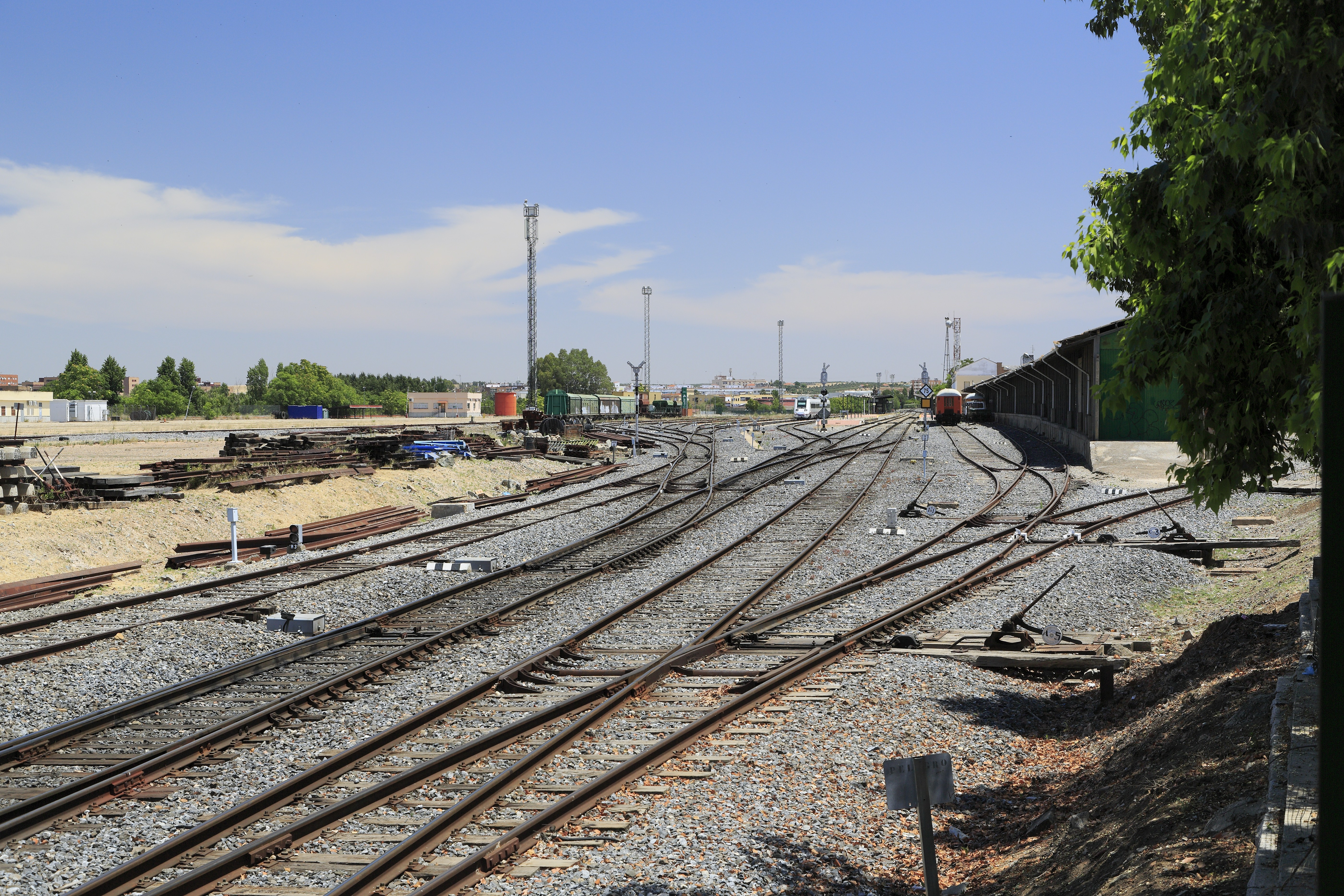 Vom Westkopf Richtung Osten. Es gibt drei Bahnsteiggleise. In den Ostkopf im Hintergrund mündet nur die Strecke von Puertollano.